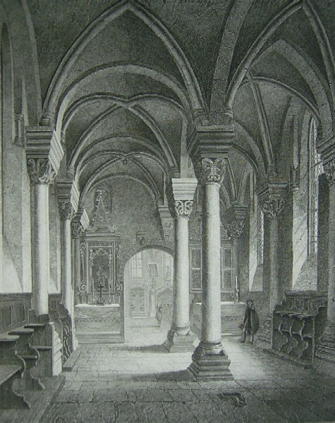 Nürnberg, romanische Euchariuskapelle an St. Egidien, Stahlstich, um 1860